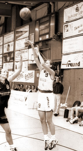 Anette Pieper (1997/98)